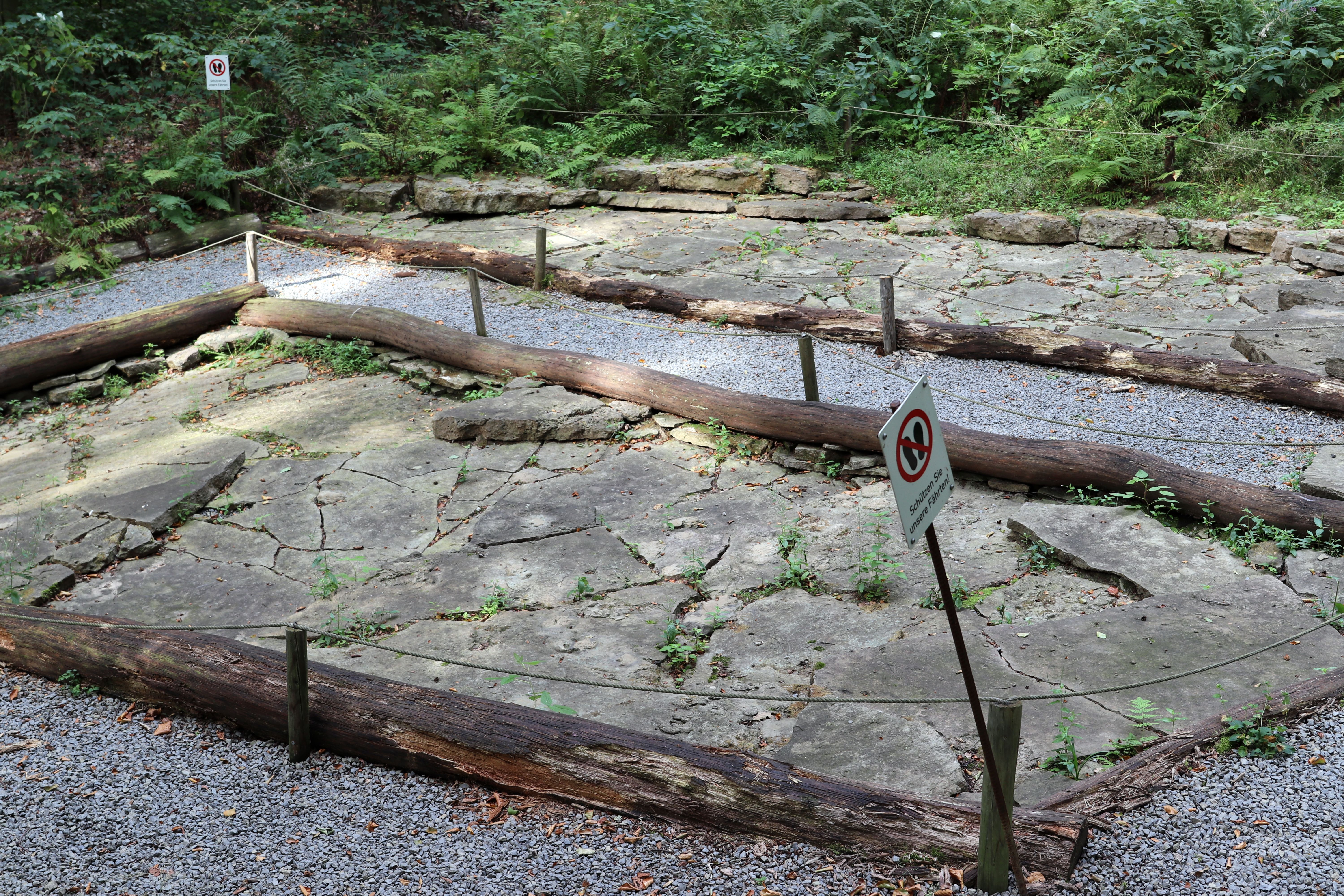 Geotop "Saurierfährten Euerdorf"